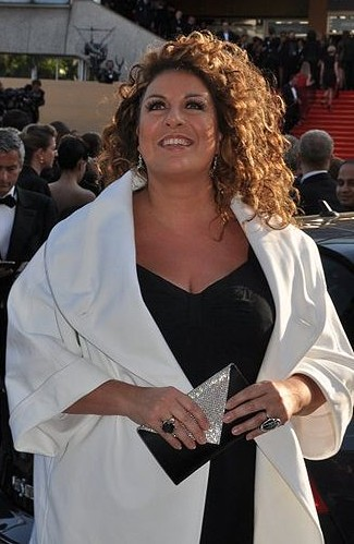 Marianne James au festival de Cannes